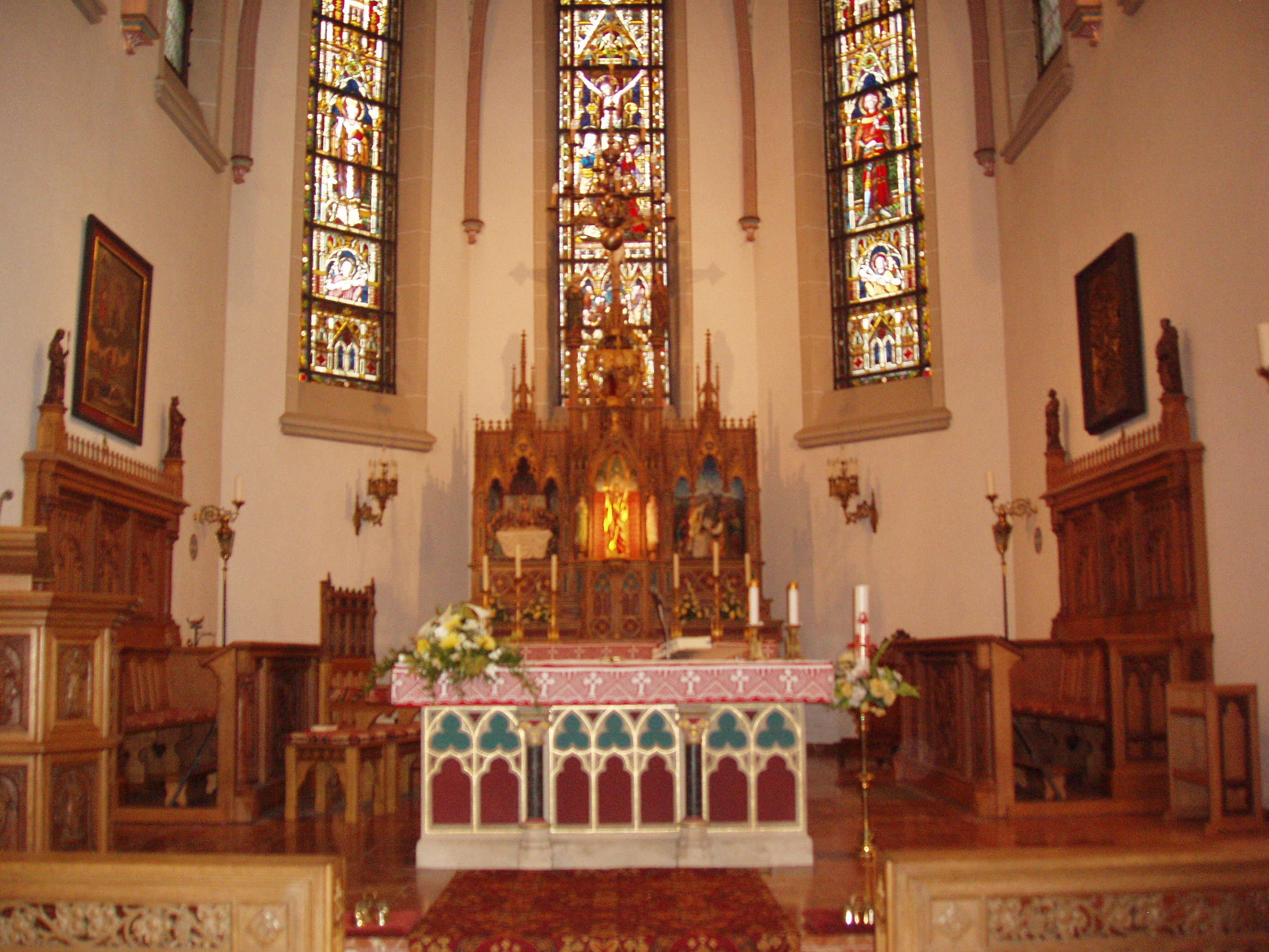 Blick in den Altarbereich der St.-Barbara-Kirche in Langenfeld-Reusrath